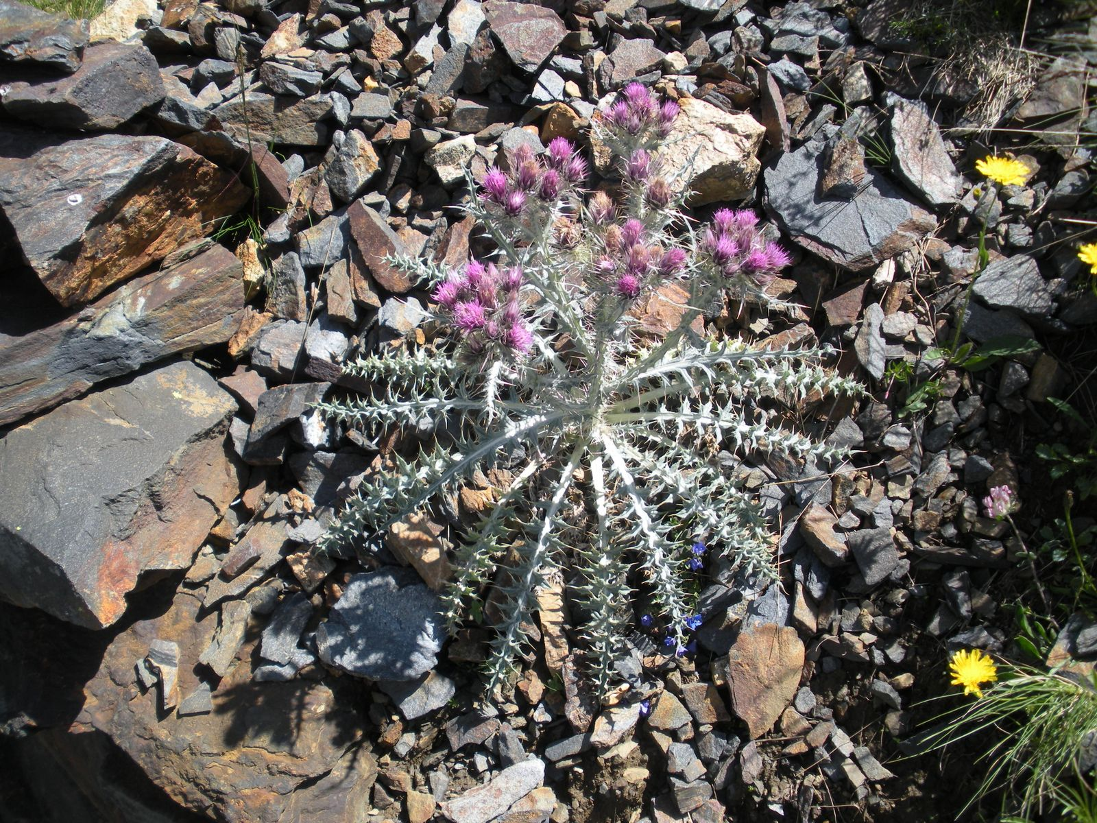 Carduus carlinoides